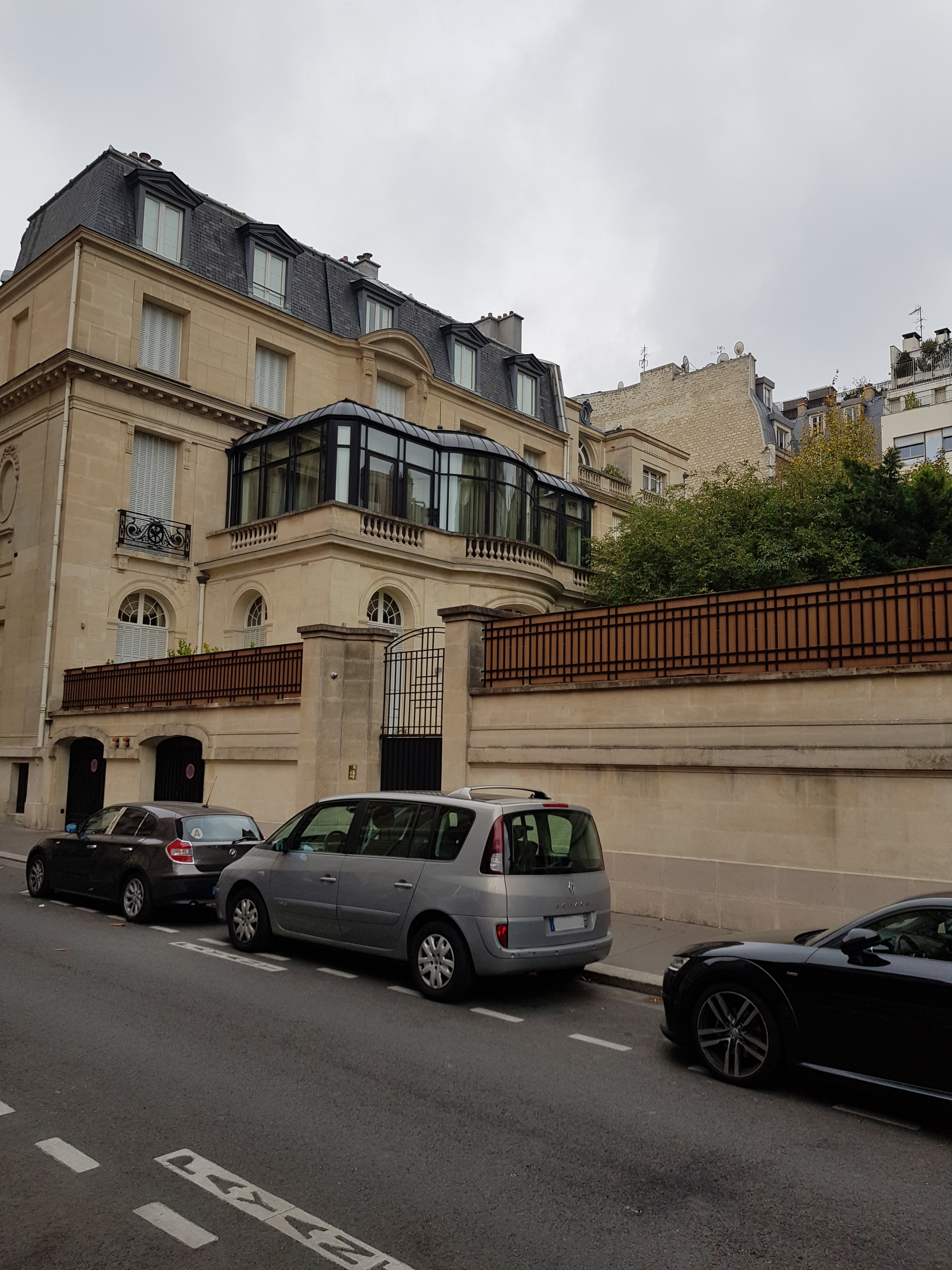 Immeuble 1, rue Henri-de-Bornier, Paris 16 e.